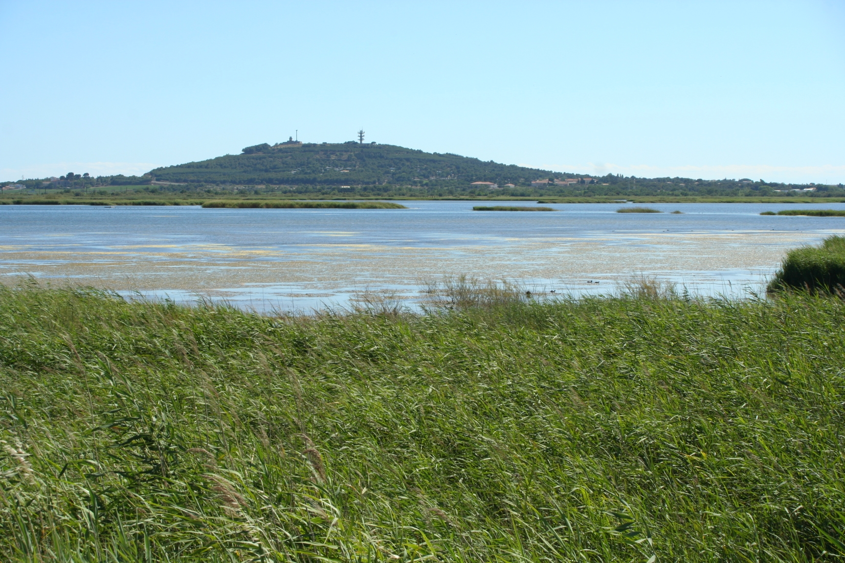 Étang du Bagnas, (Agde, Hérault) vu de la rive des Mougères